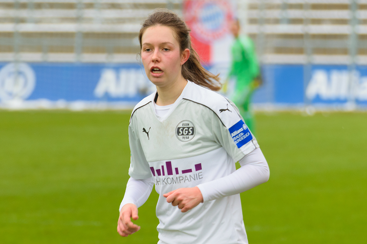 Jana Feldkamp at FC Bayern vs SGS Essen